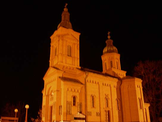 Црква Покров пресвете Богородице у селу Тутњевац, општина Угљевик.